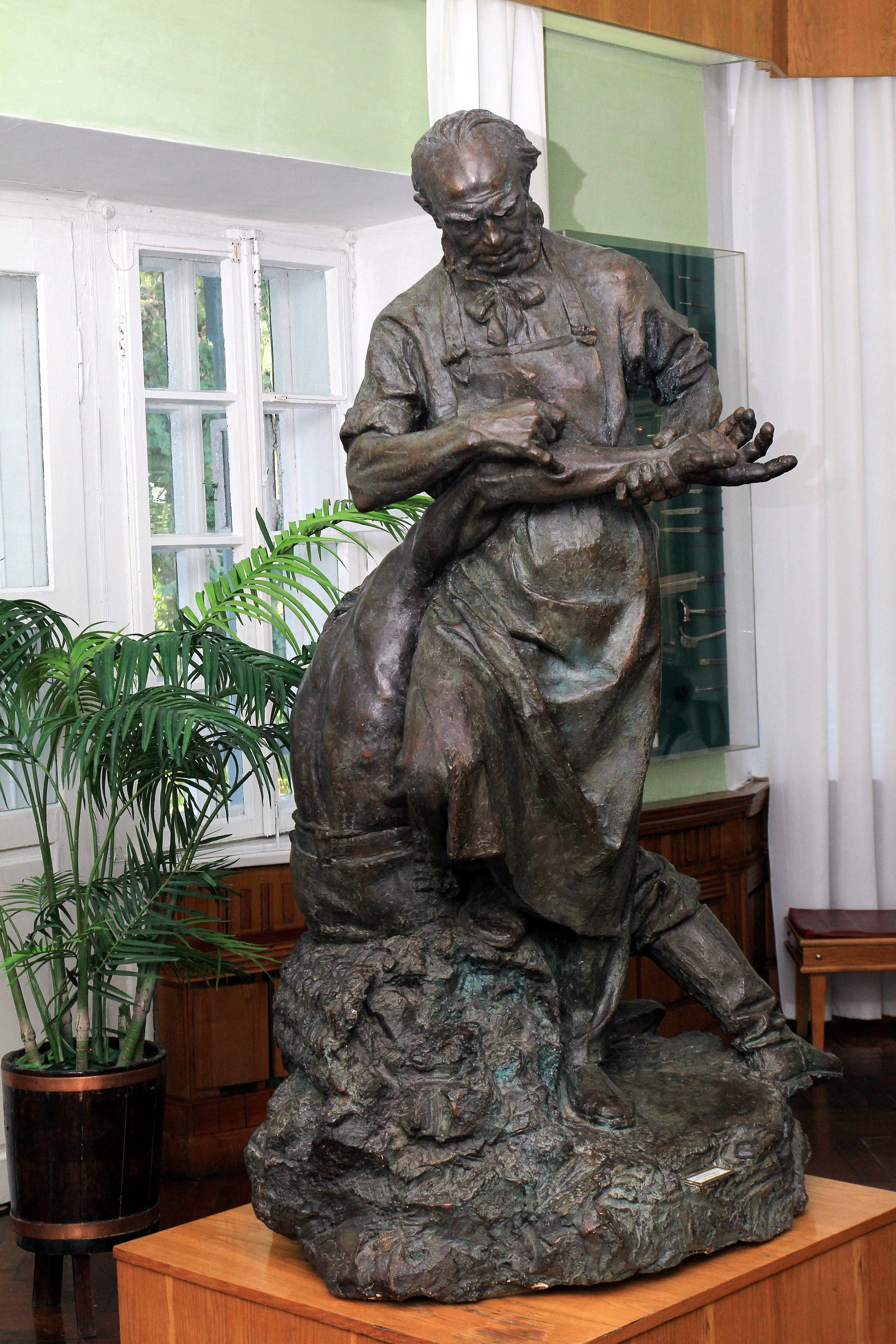 Вінниця - Садиба Пирогова - вул. Пирогова, 155